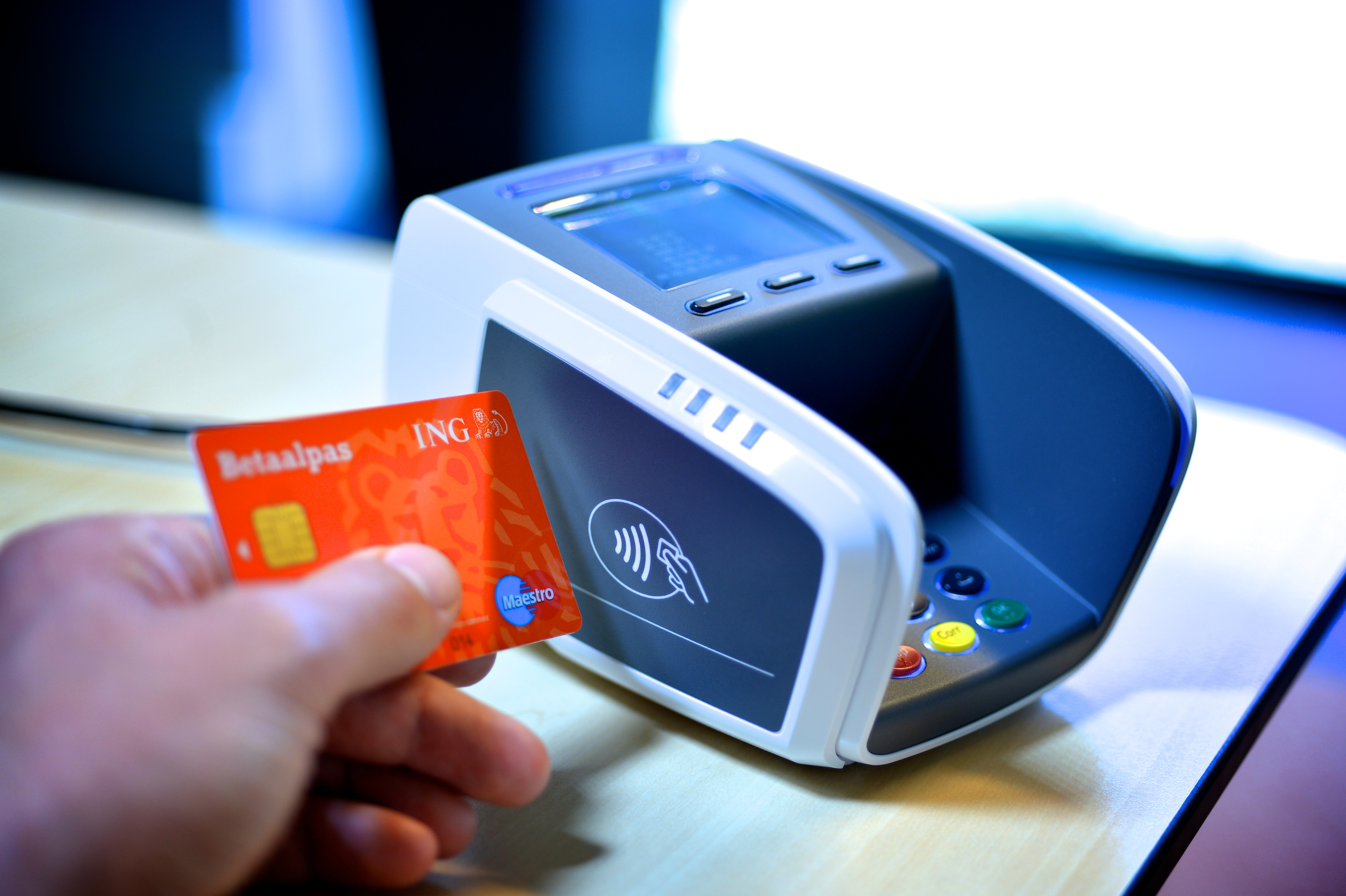 Een pinautomaat met NFC-chiplezer en pinpas.